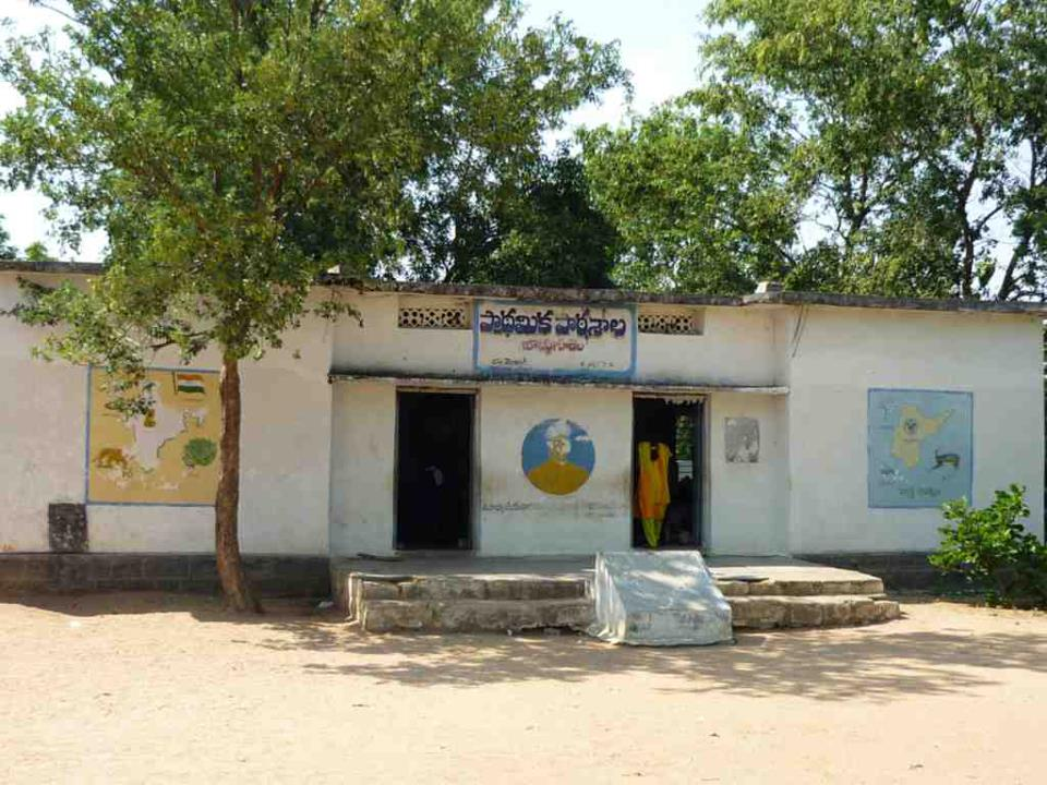 బొడ్డుగూడెం పాఠశాల